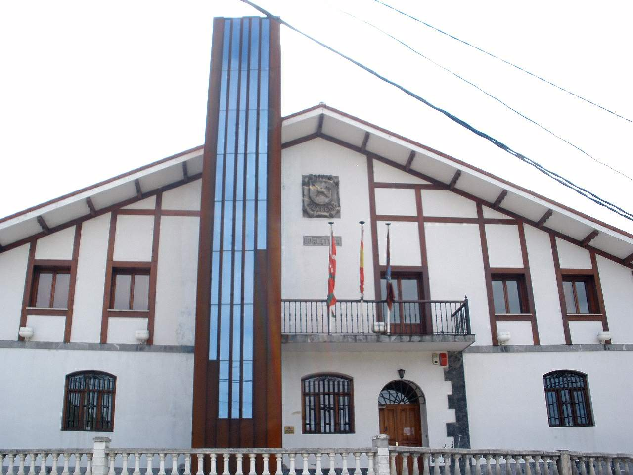 Ayuntamiento de Zierbena (Vizcaya)